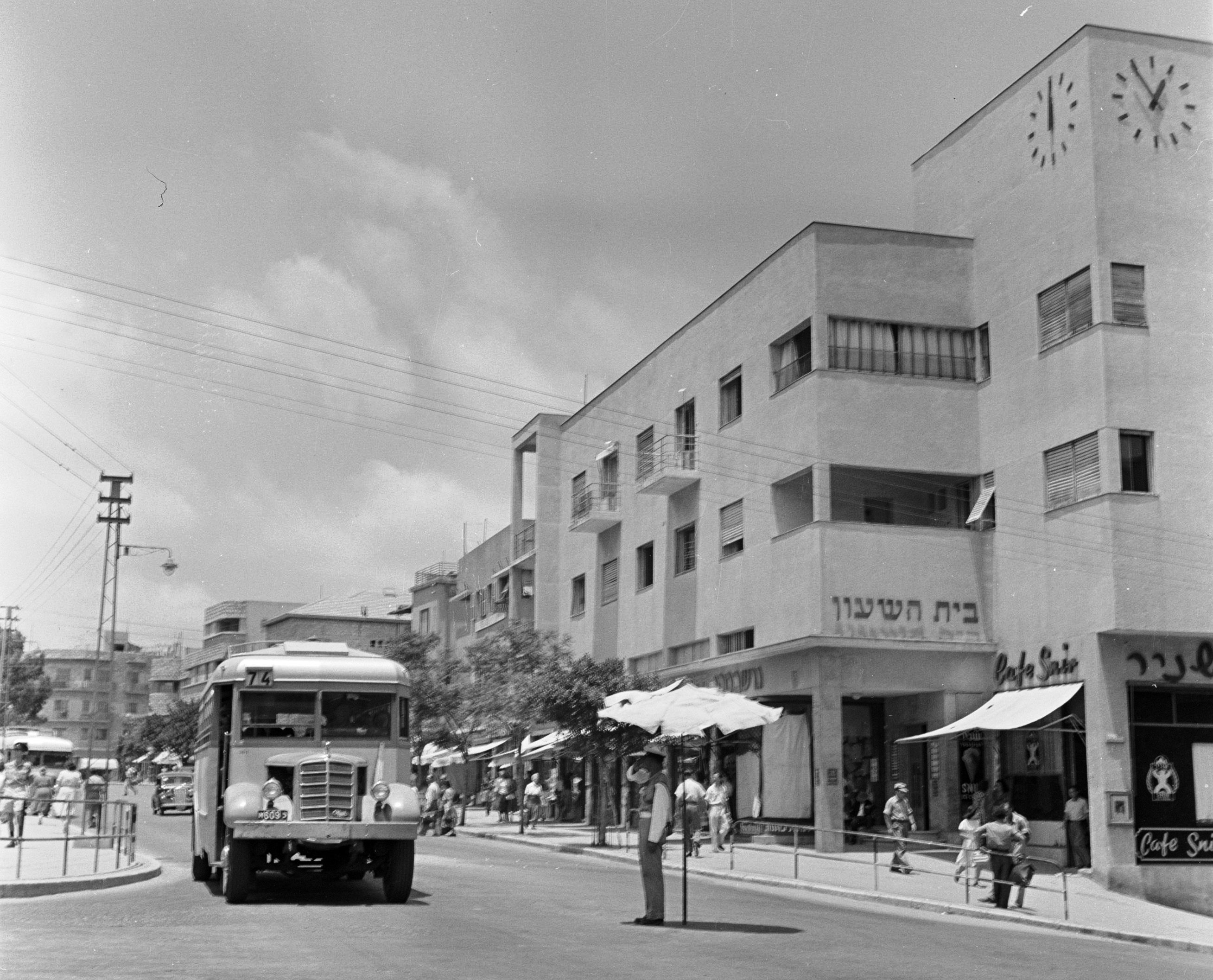 Haifa. Verkeersagent onder een parasol op een kruispunt in de binnenstad.